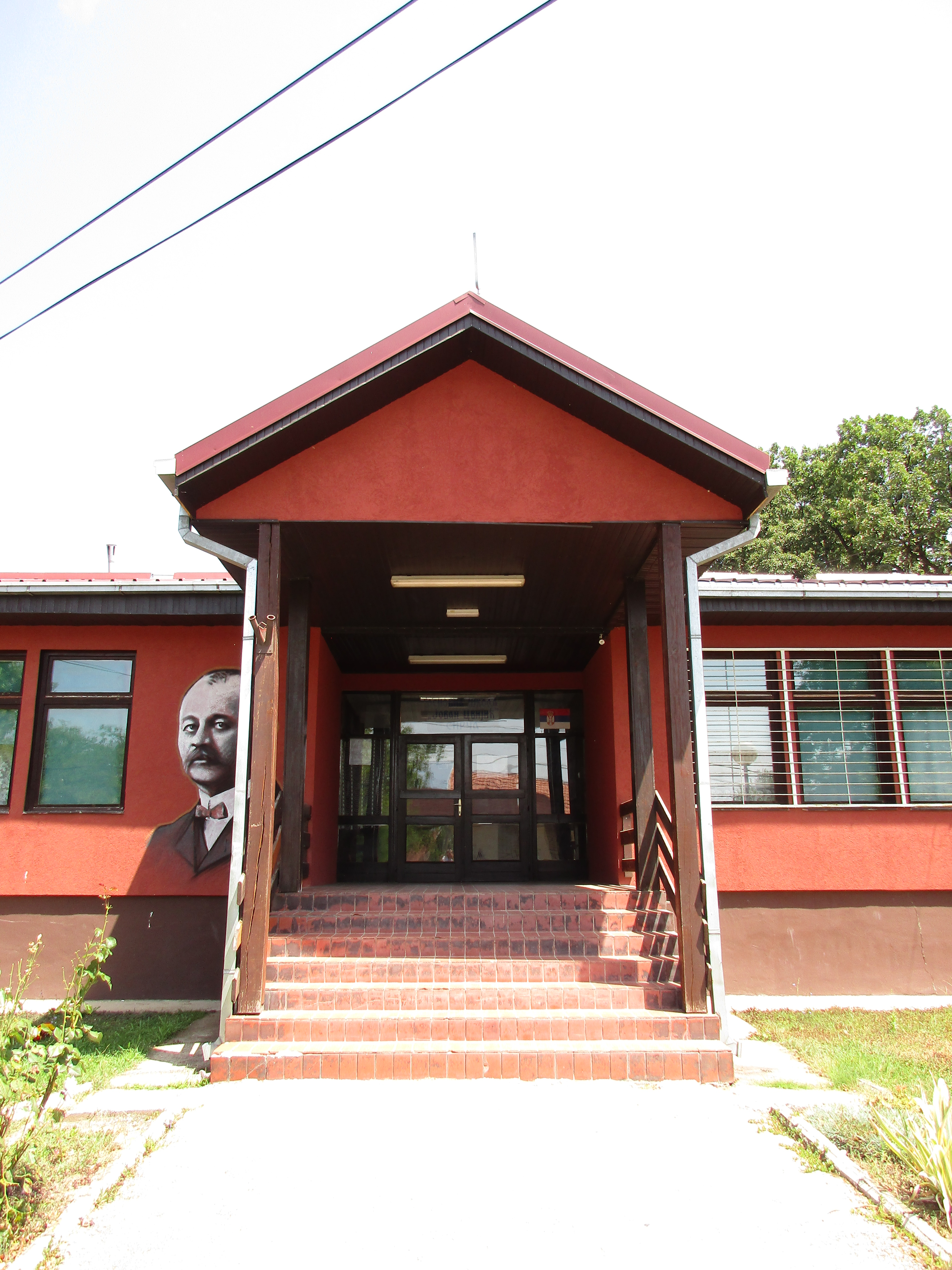 Srpski (latinica): Osnovna škola Jovan Cvijić, Sirča